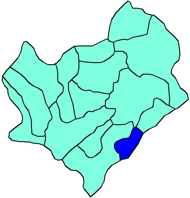 Situación de la parroquia de Quinzanas en el concejo de Pravia